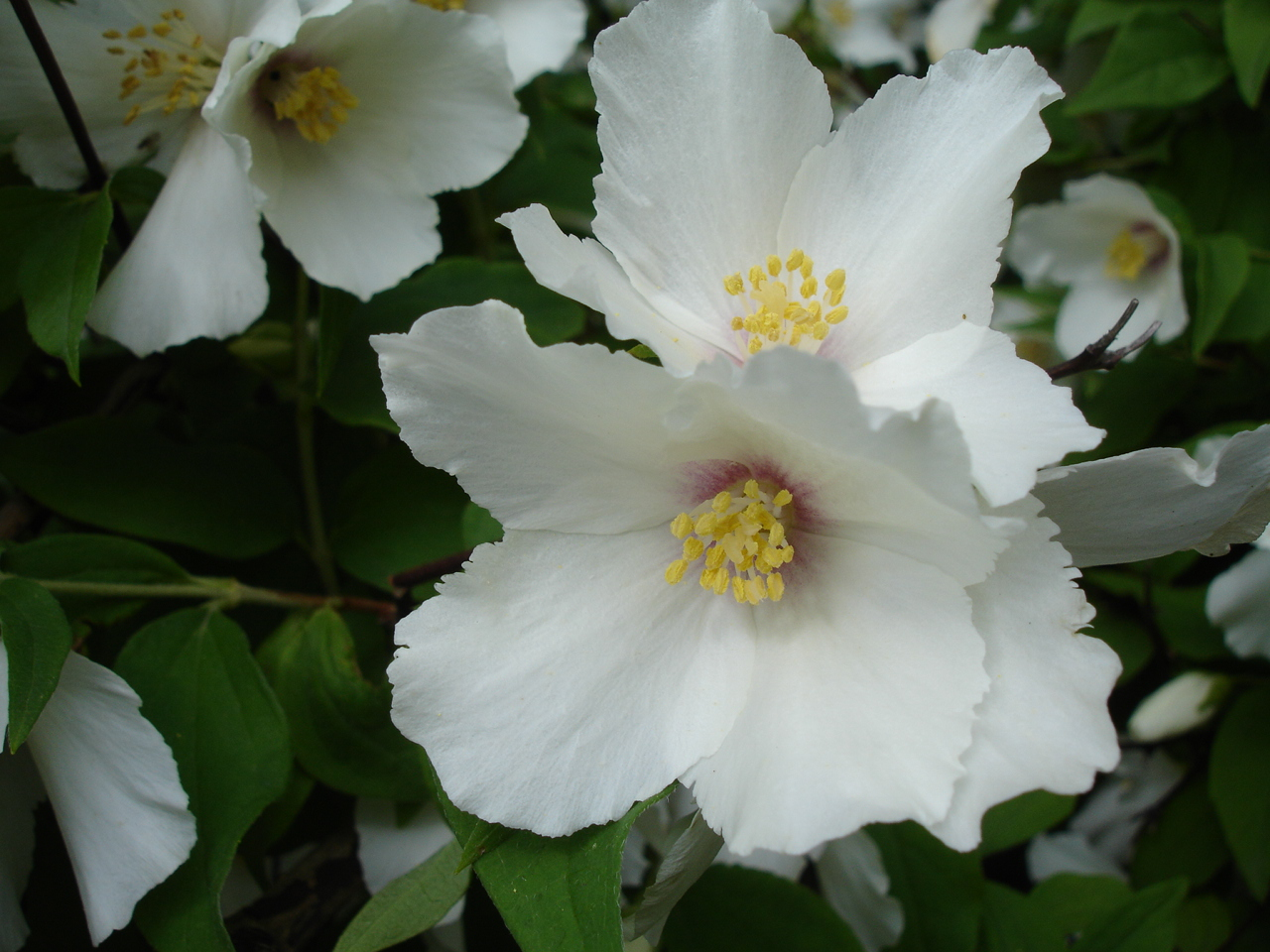 Philadelphus 'Belle Étoile'